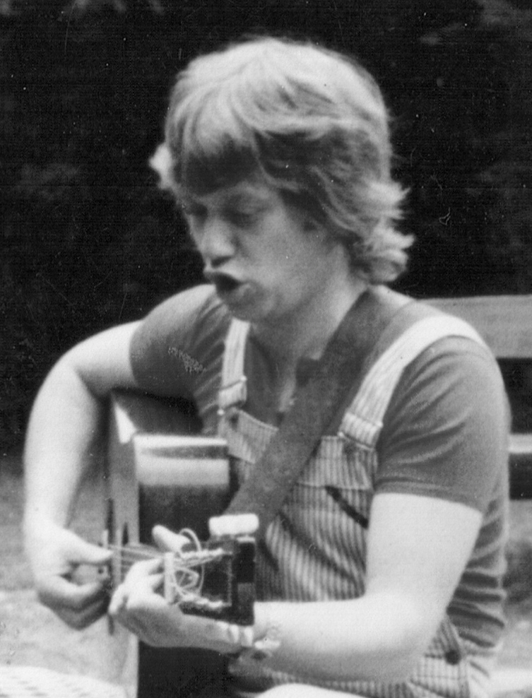 Rolf Zuckowski, Foto einer Kompaktkamera aus den Jahr 1981.